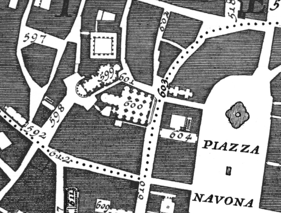 Pianta di Nolli